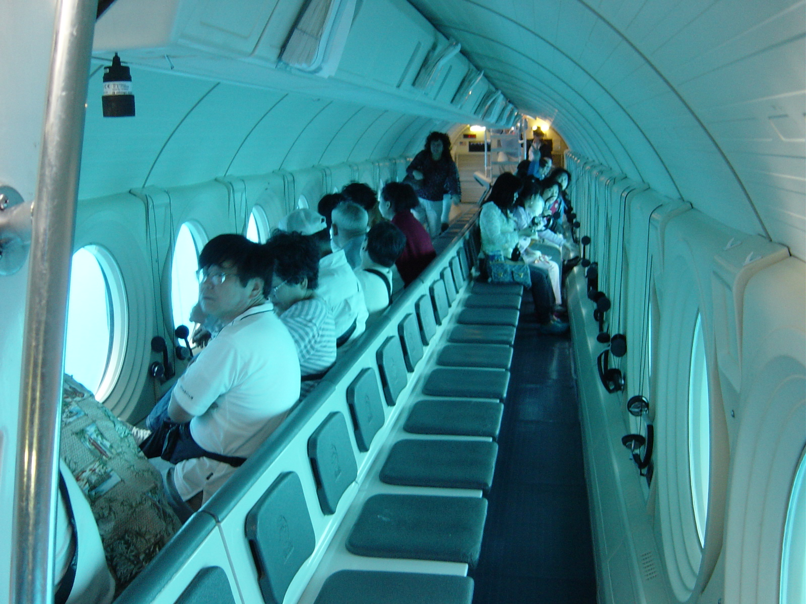 The Submarine Altanta in O'ahu,Hawaii